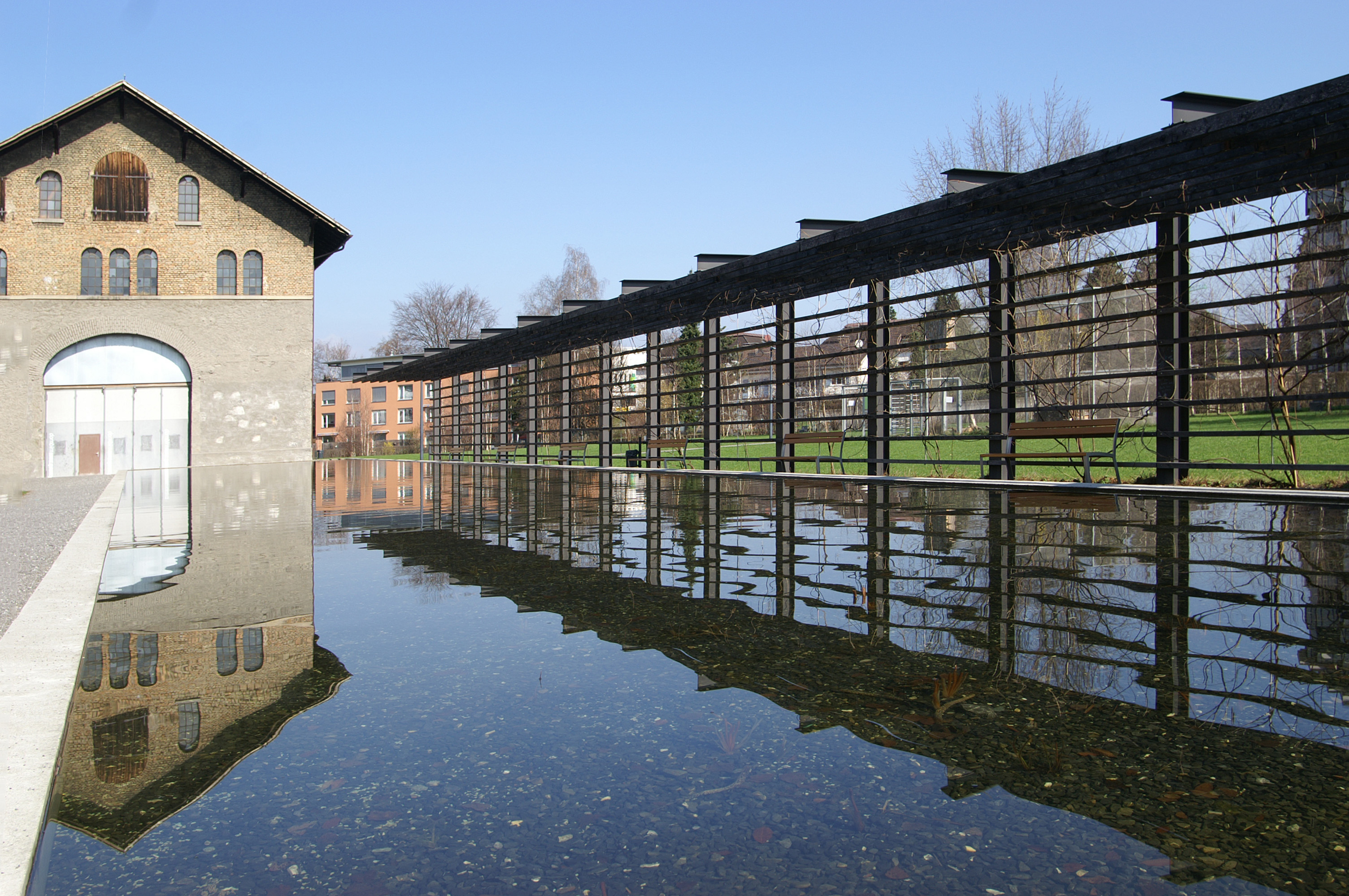 Erlebnis Museum INATURA